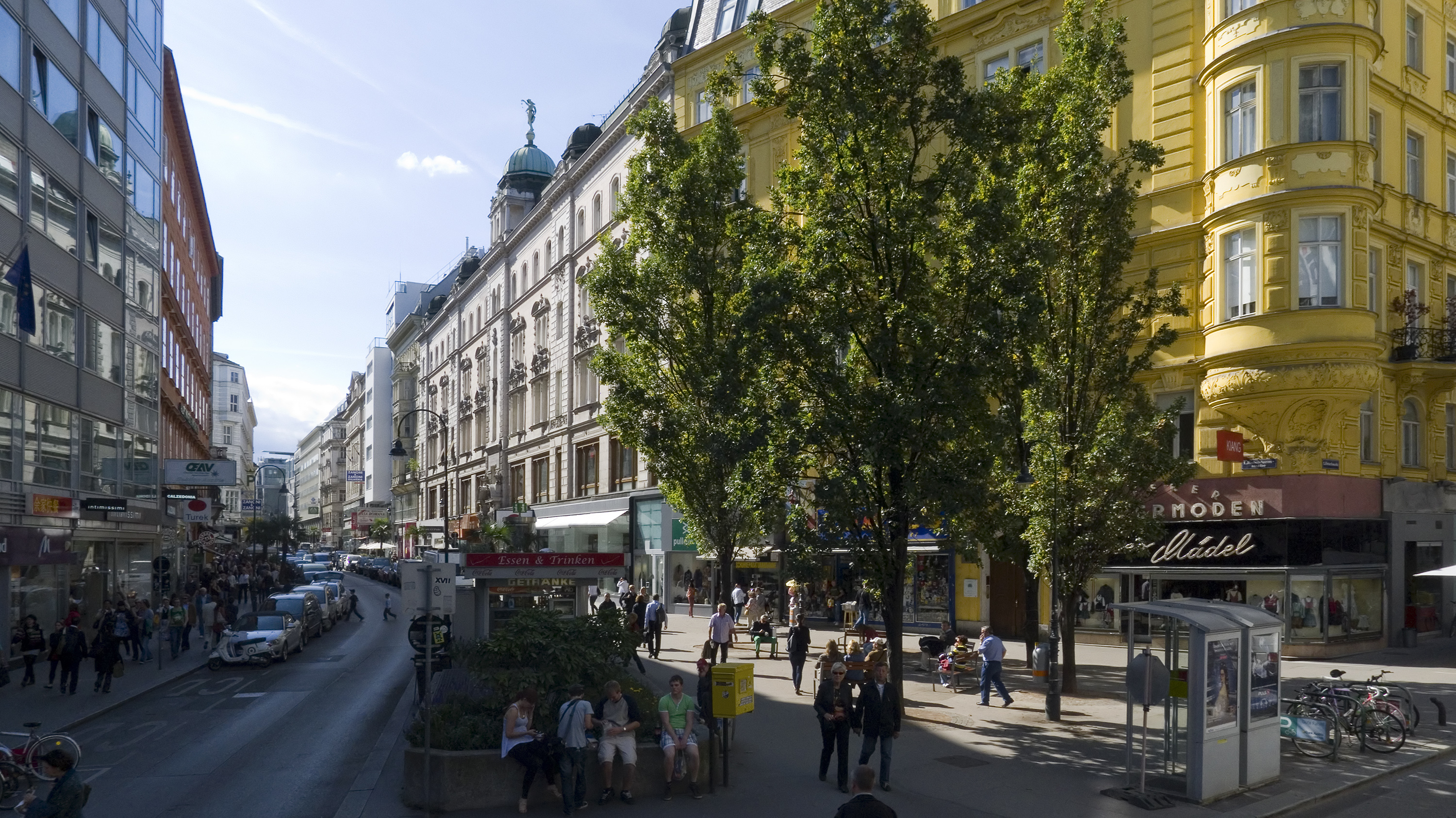 Rotenturmstraße in Wien 1 beim Fleischmarkt Richtung Südwesten